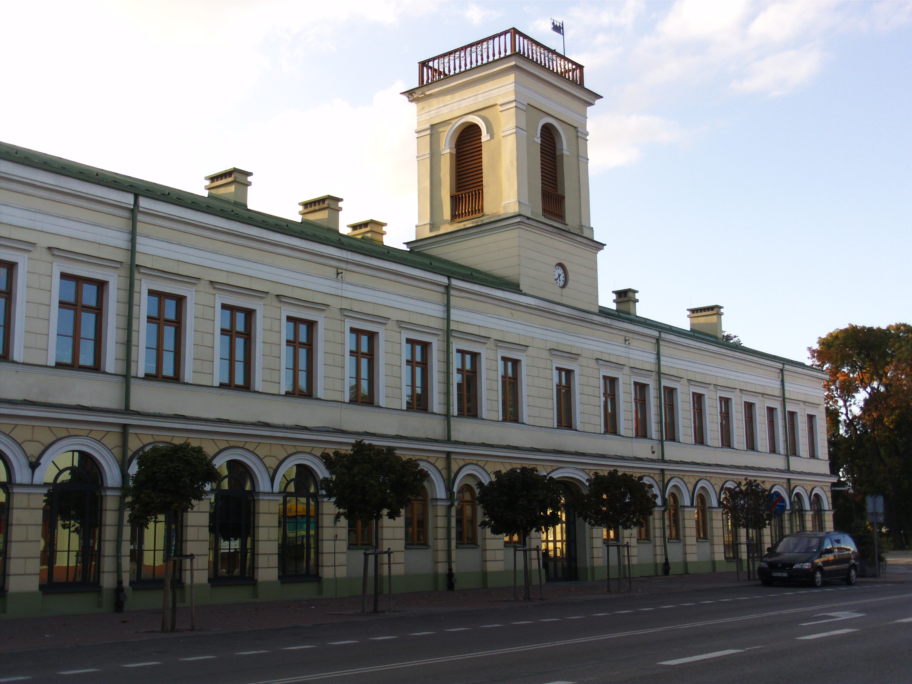 Ratusz Miejski w Suwałkach